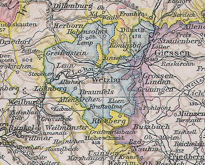 Lage Kreise Wetzlar und Braunfels